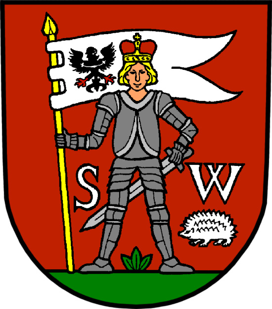 Znak obce Stonařov